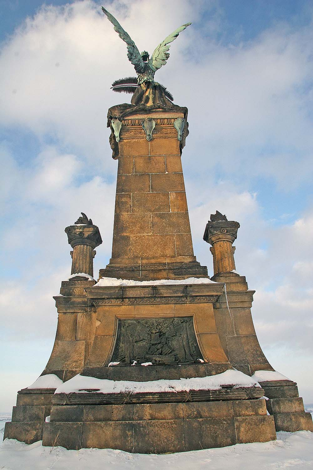 Památník bitvy u Kolína 18. června 1757. district Kolín